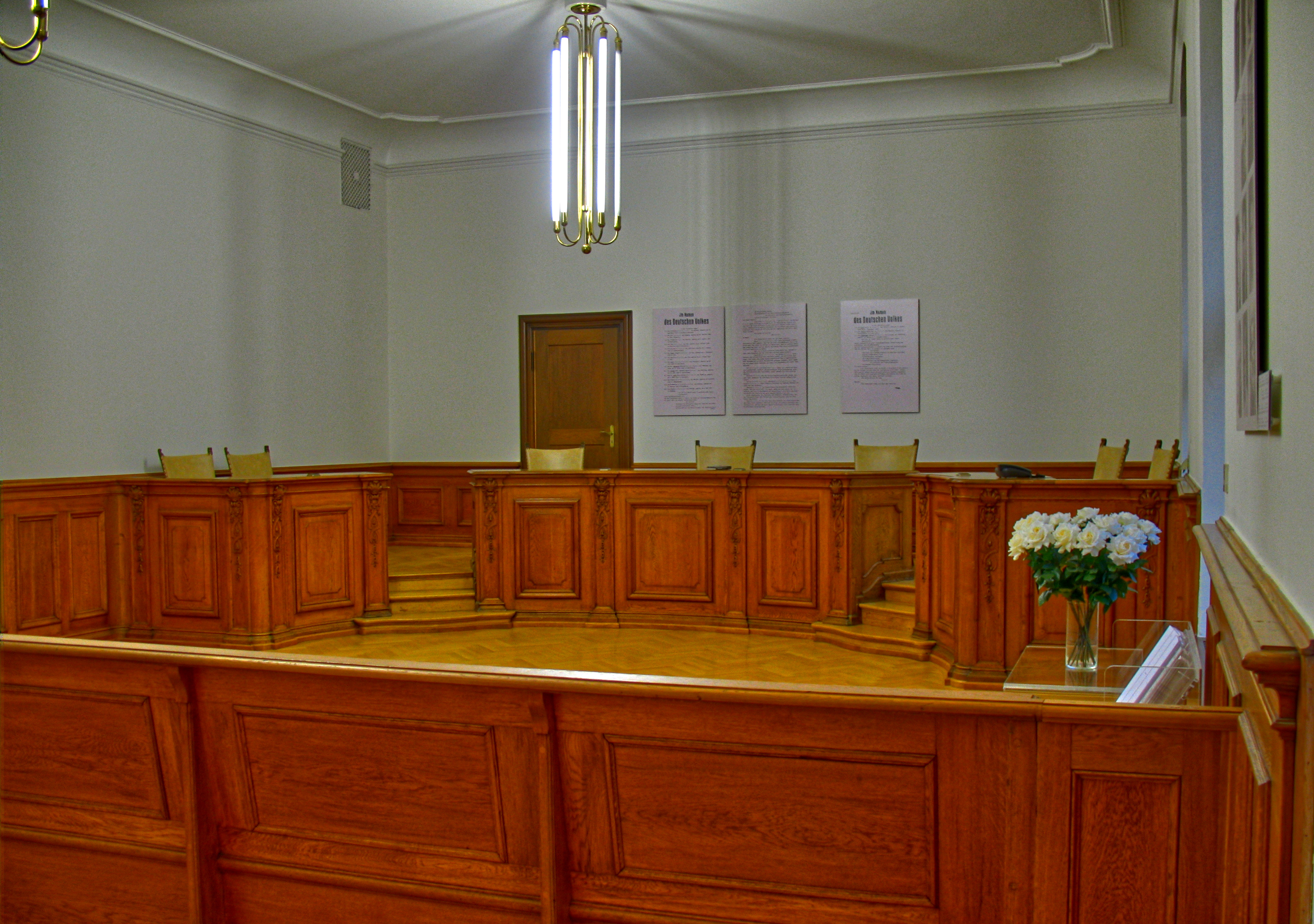 Deutschland, Bayern, München, Justizpalast, Raum 253, Dauerausststellung zur "Weißen Rose"